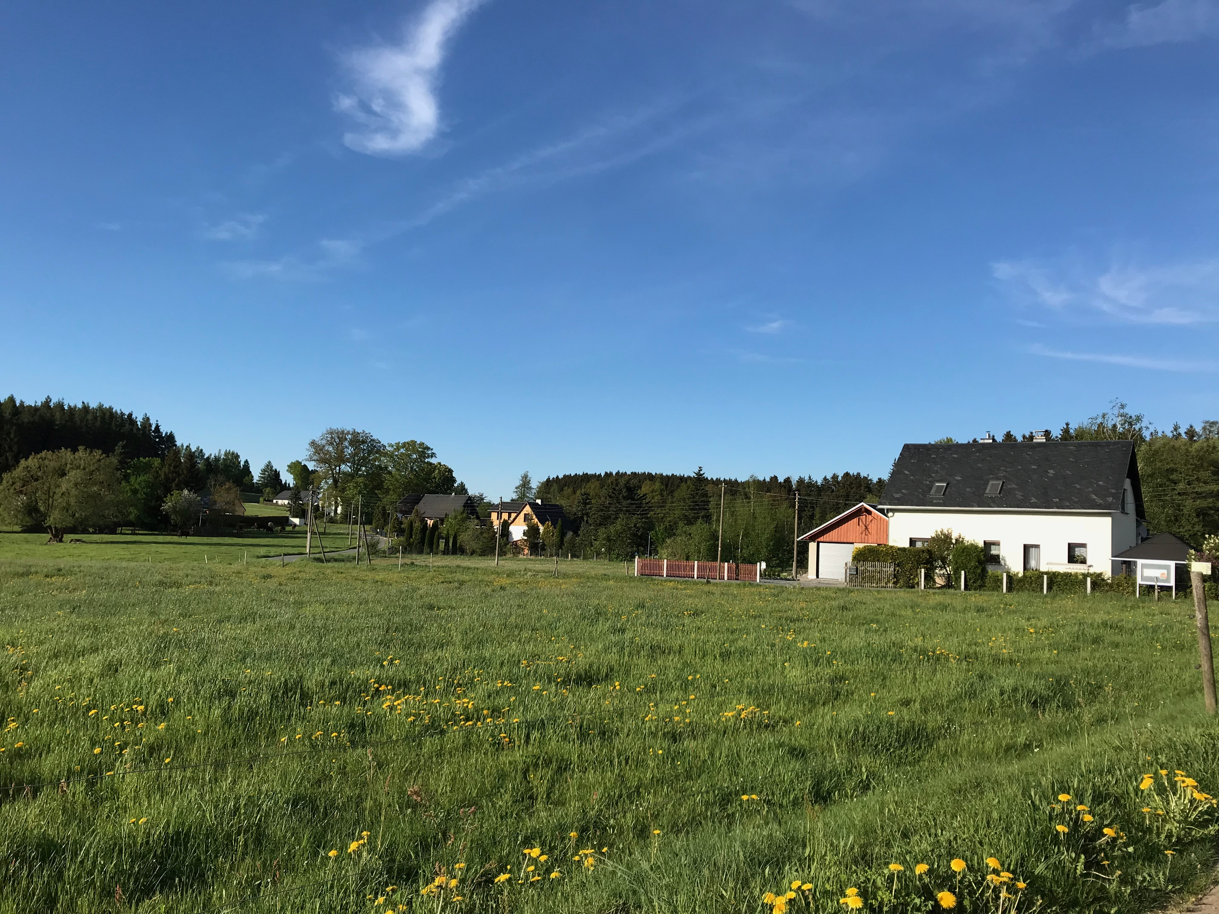 Ansicht Ortsteil Mahnbrück